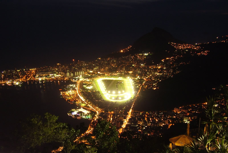 Vista noturna do Corcovado